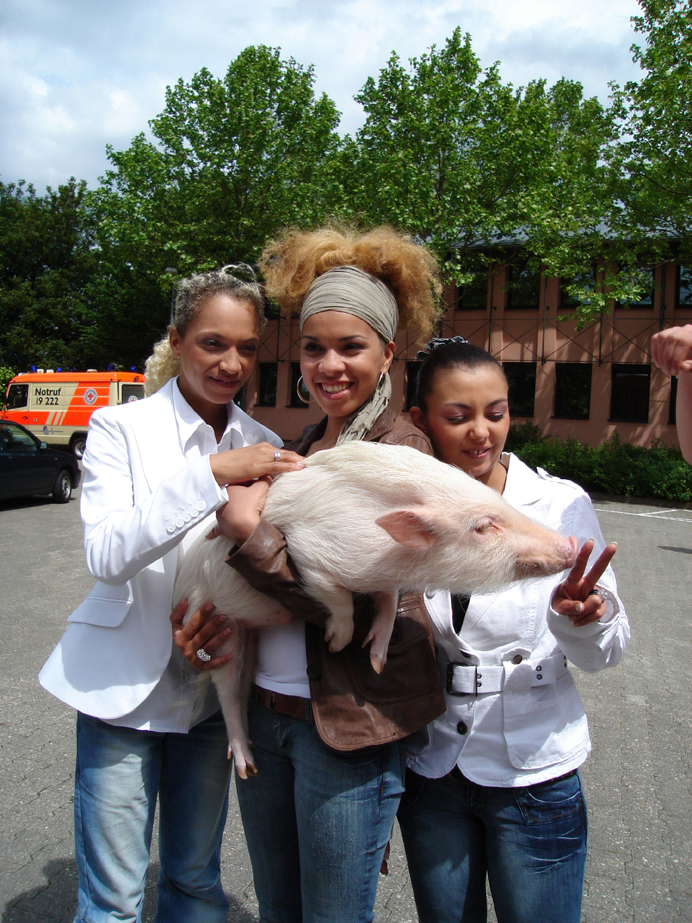 Tic Tac Toe beim Fernsehgarten